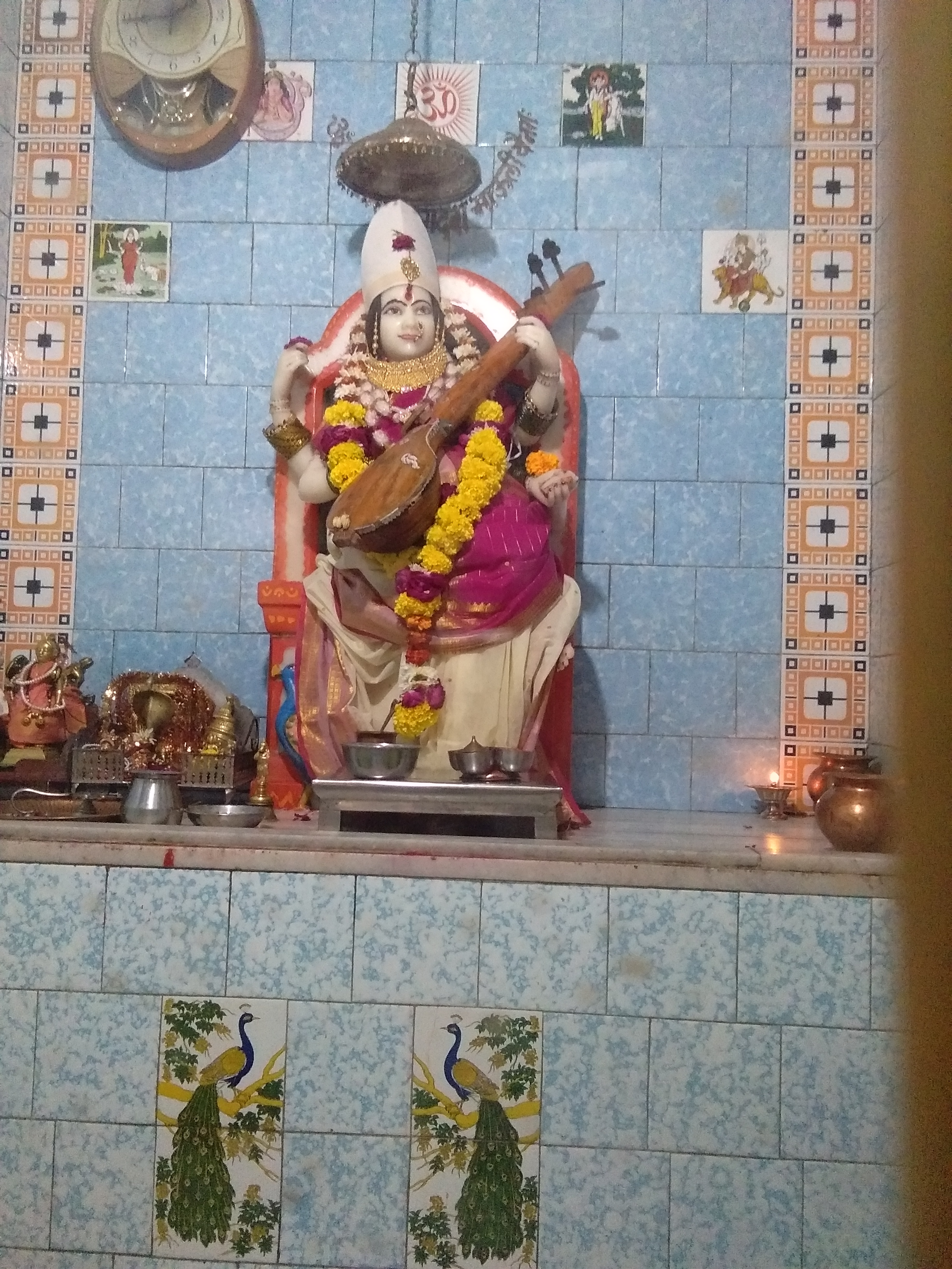 सरस्वती देवालय